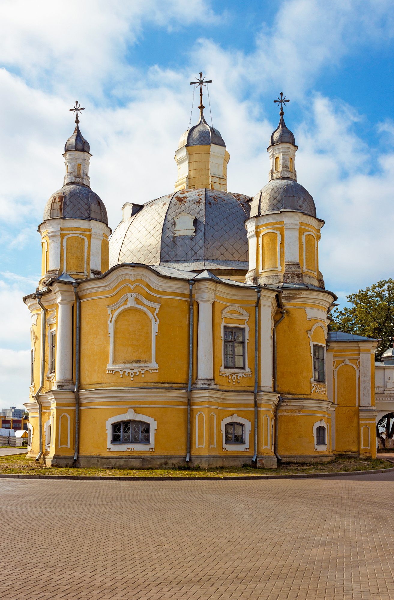 Собор Воскресенский: Кремлевская площадь, 1 (улица Орлова, 15), Вологда, Вологодская область